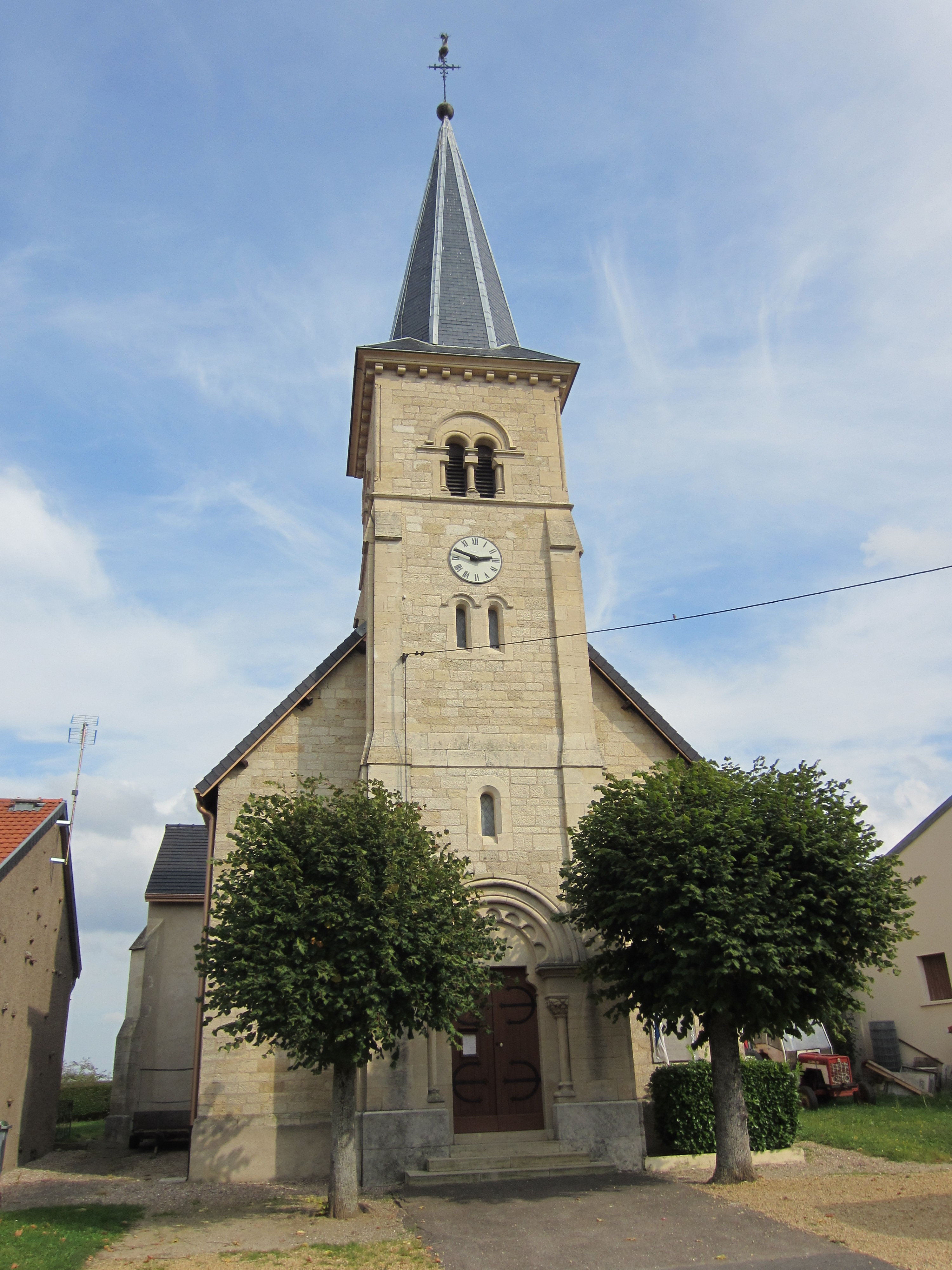 Description eglise Xonville eglise Xonville